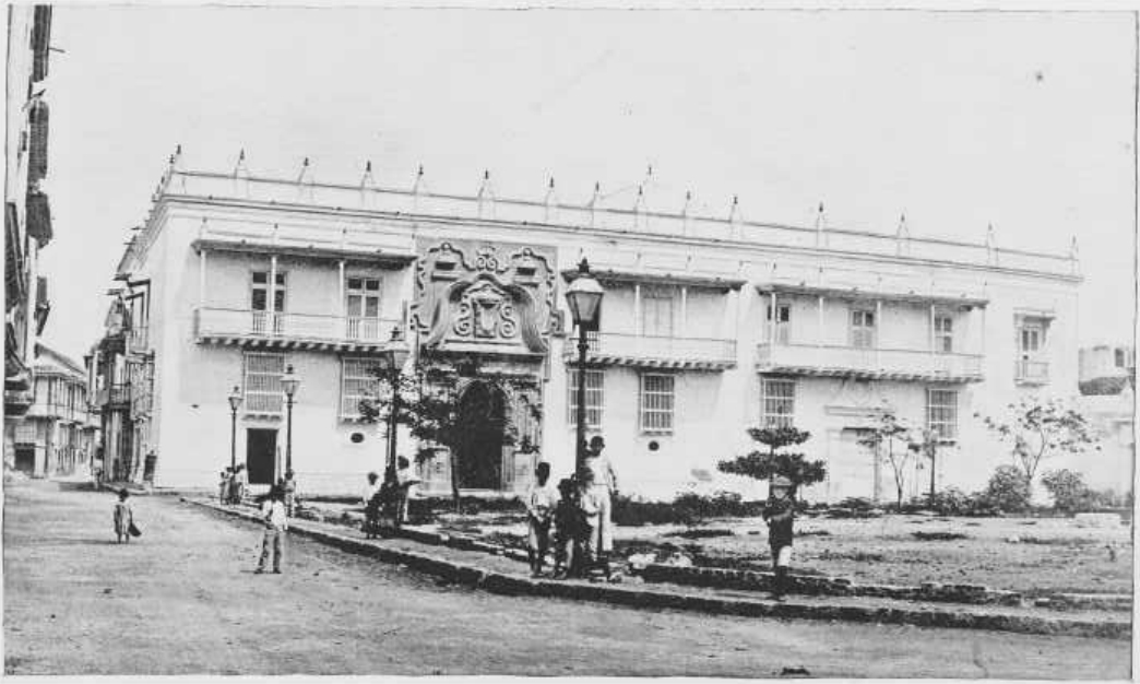 Ancien bâtiment de l'Inquisition à Carthagène des Indes, Colombie